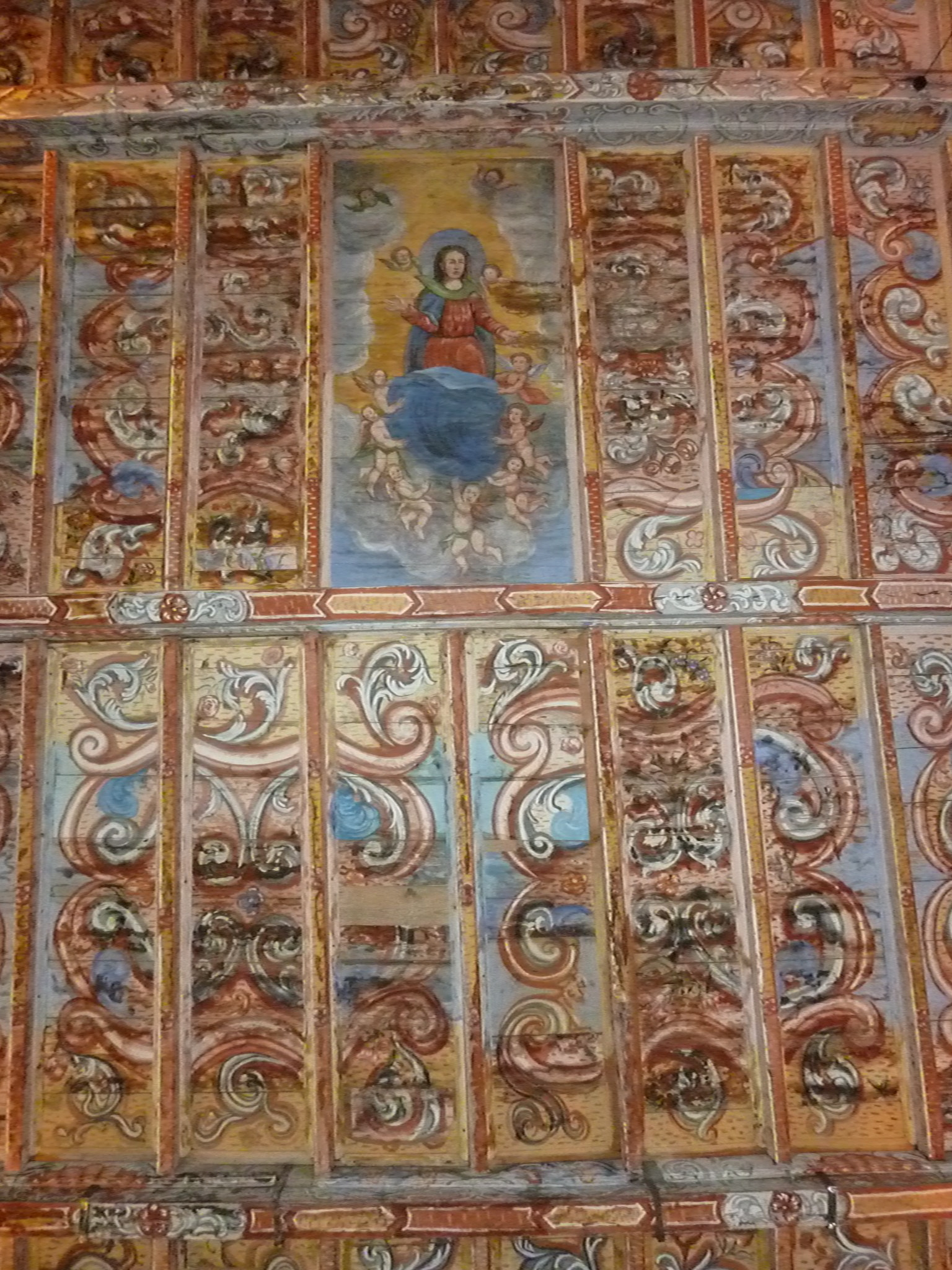 Kirche Sta Maria del Castello: Kassettendecke mit Madonna